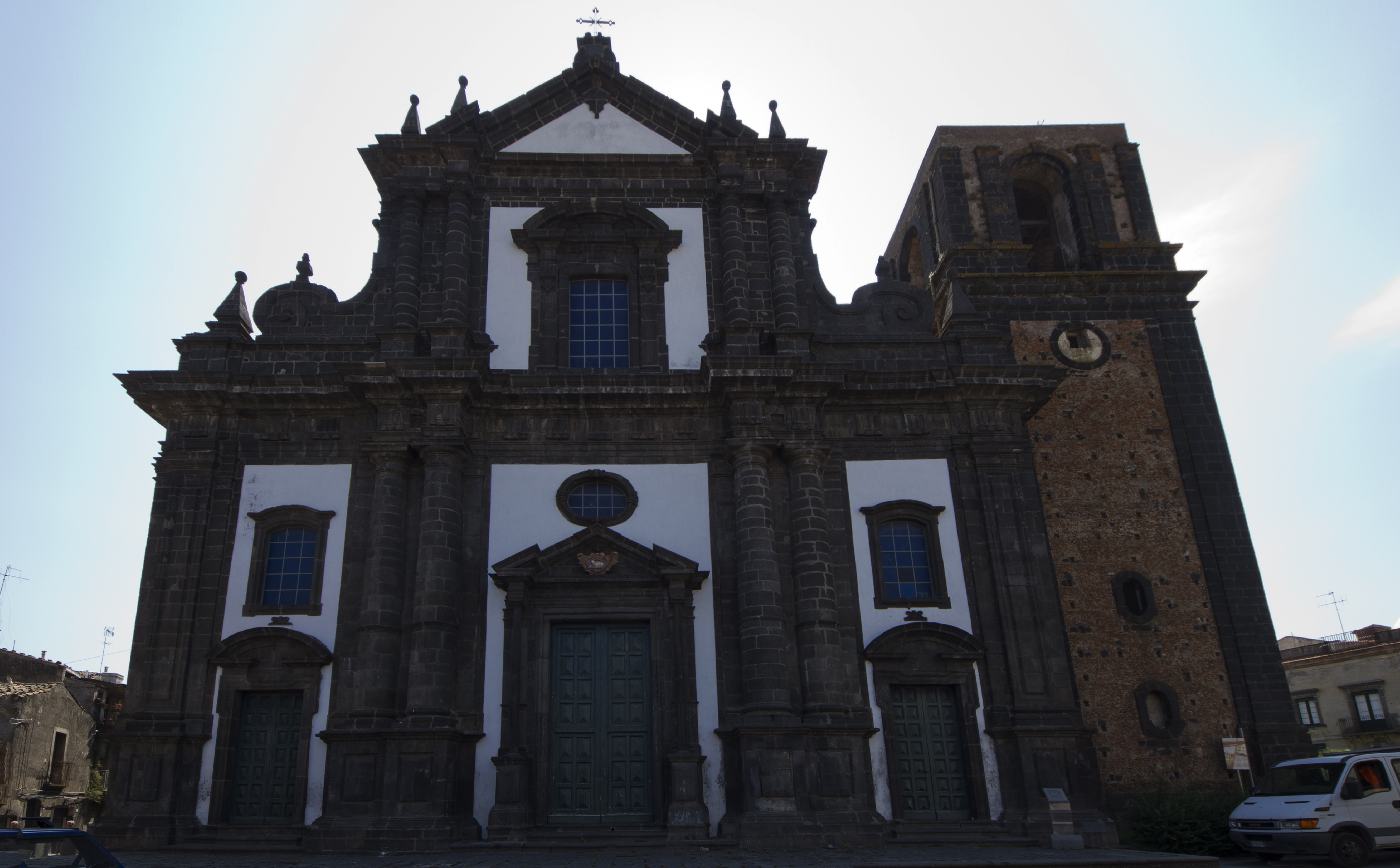 Chiesa di San Nicola, Randazzo Catania, Sicily, Italy